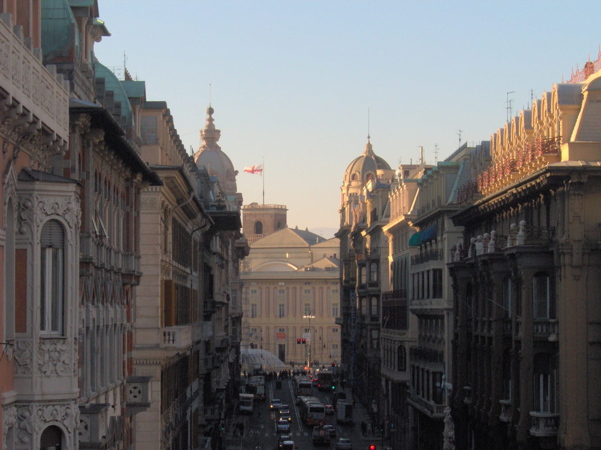 Genova - via XX settembre